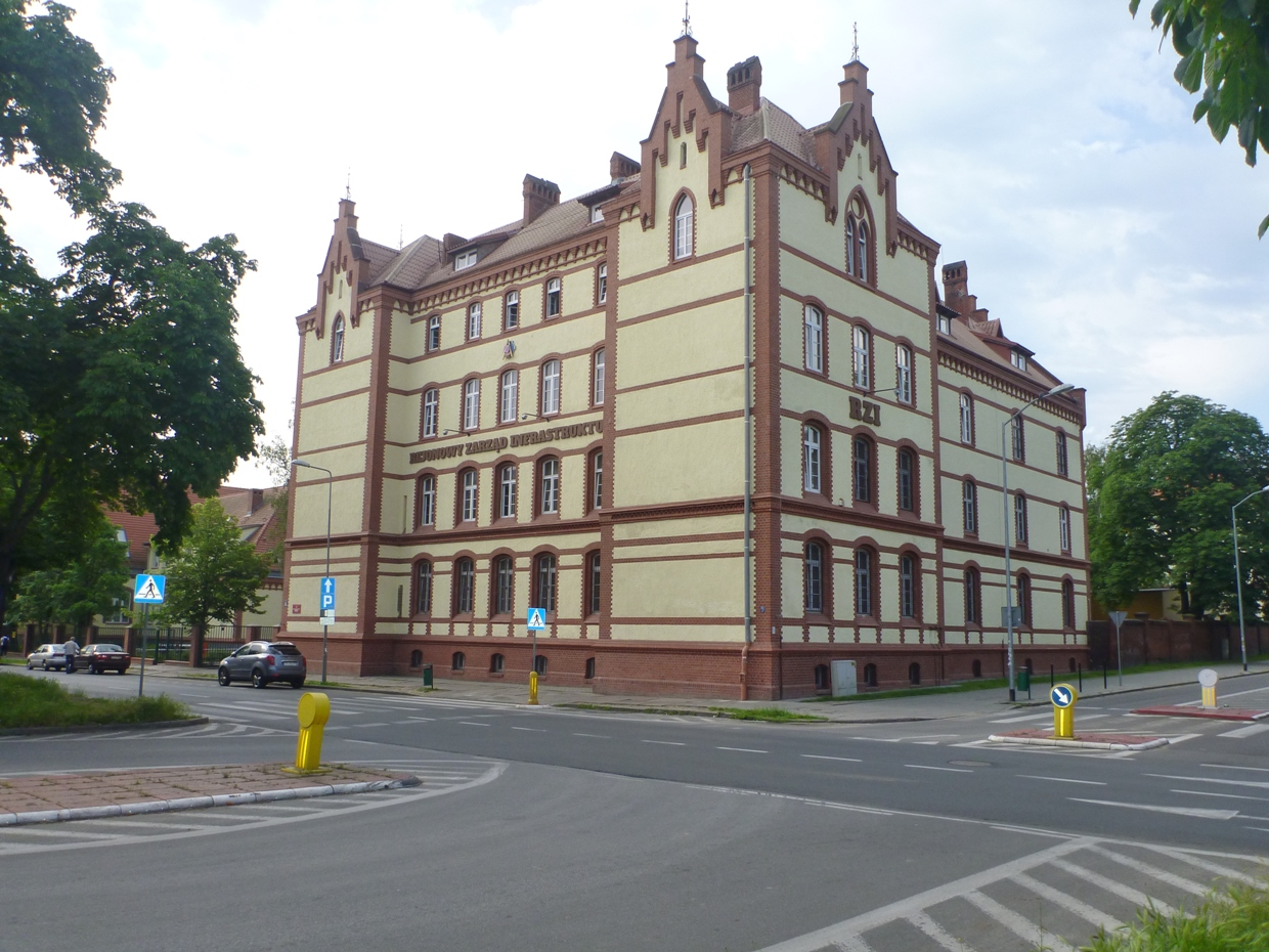 Siedziba RZI Szczecin przy ul. Narutowicza 17 B